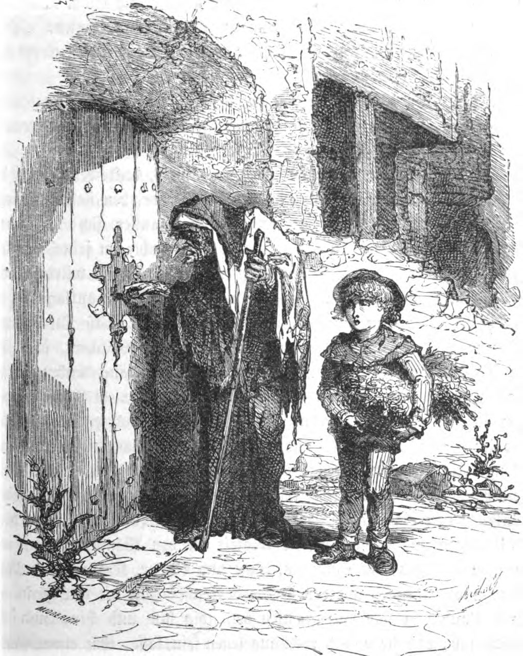 Szene aus Hauffs Märchen Zwerg Nase: Jakob trägt die Einkäufe der Fee Kräuterweis